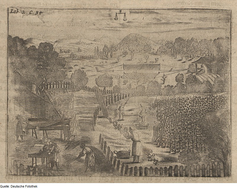 Original image description from the Deutsche Fotothek Landwirtschaft & Gut & Feld